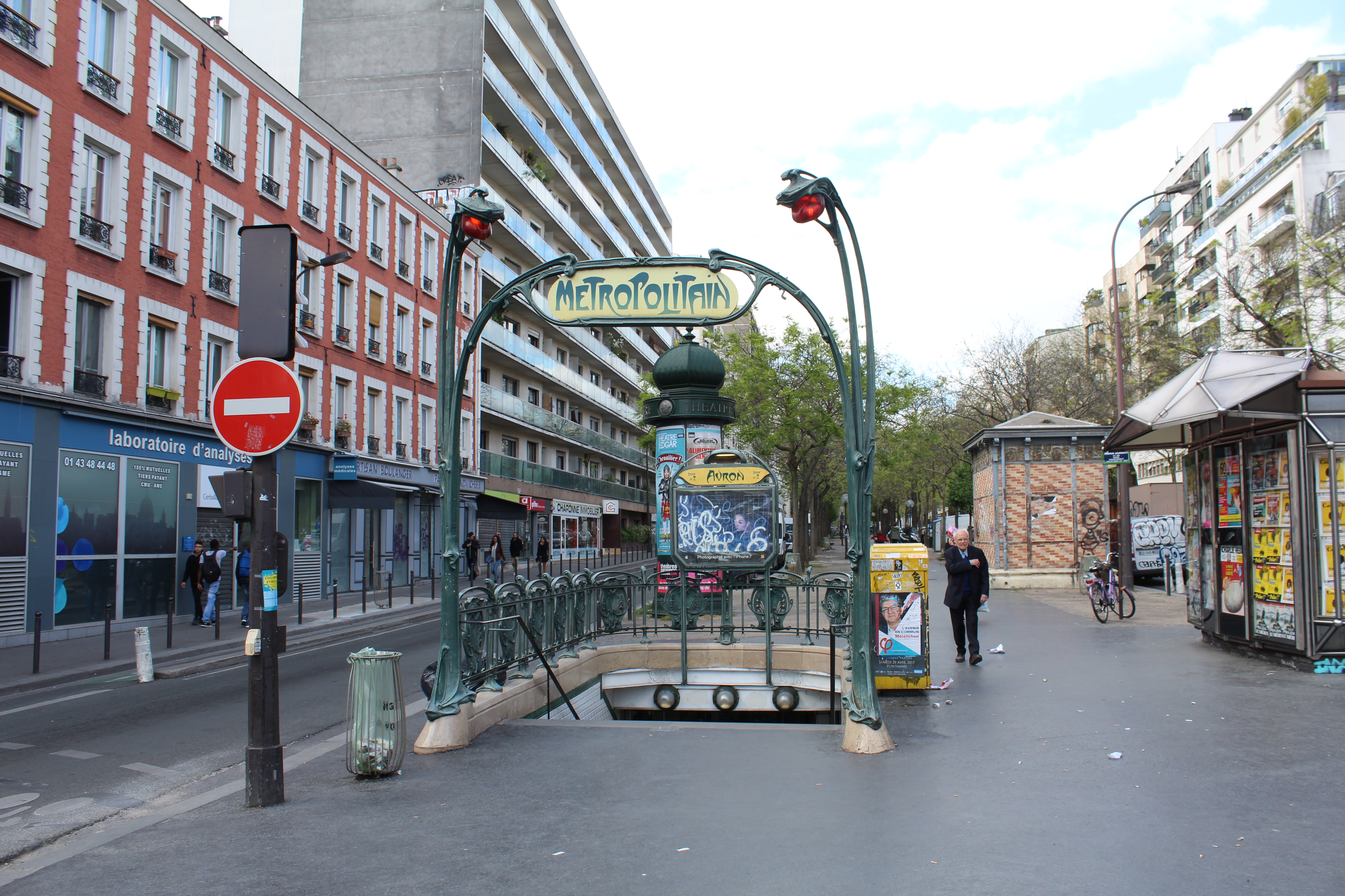 Entrée de la station de métro Avron à Paris.